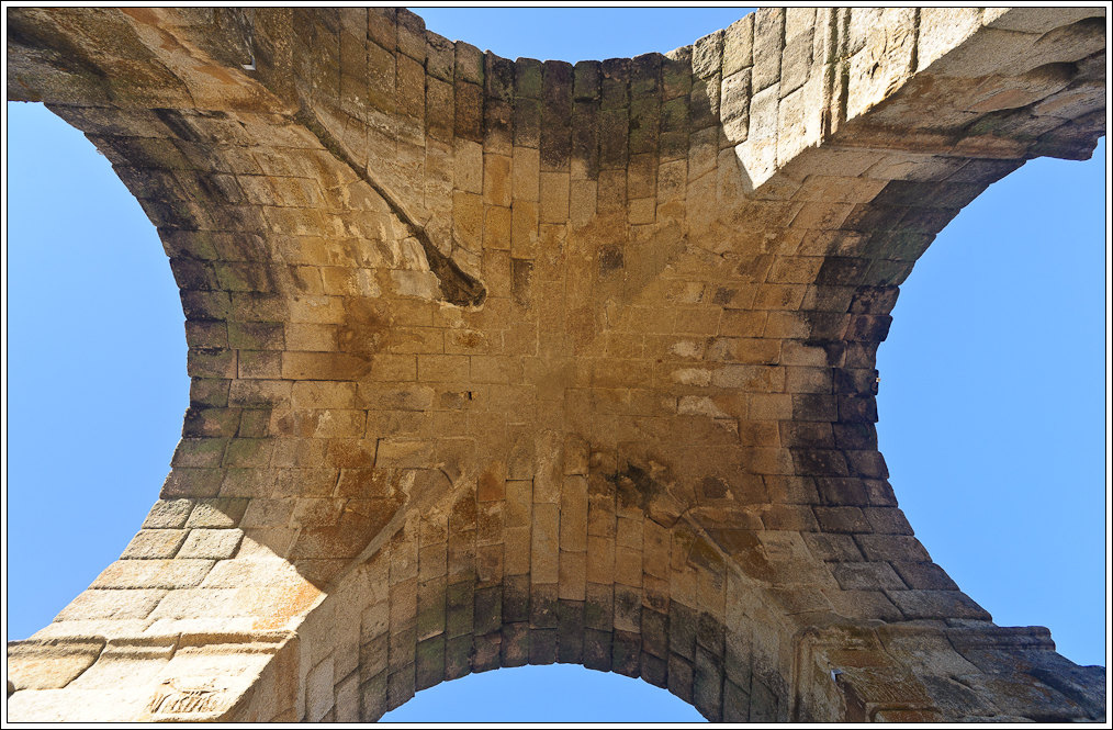 Extremadura